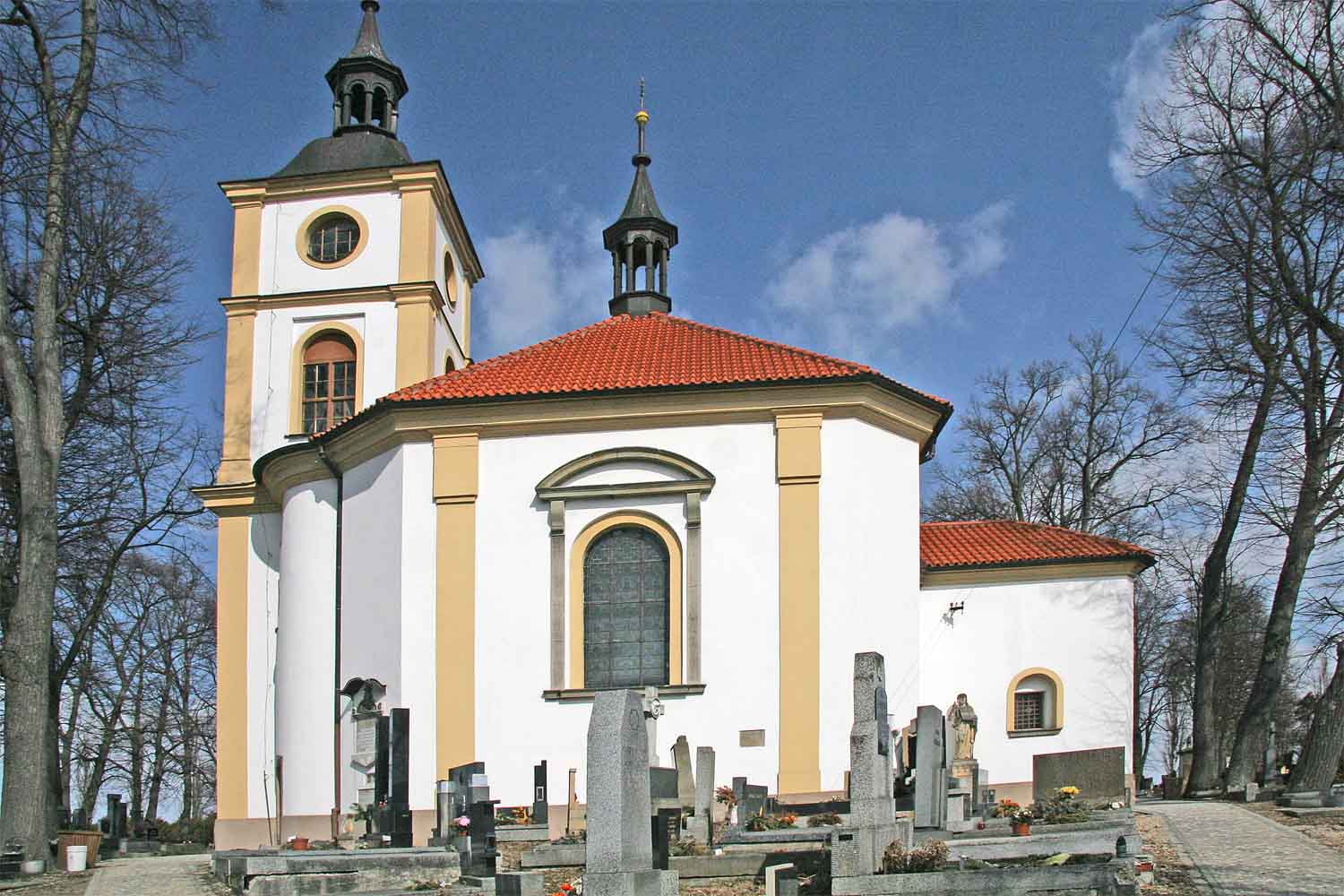 Kostel Božího Těla na vrchu Oreb u Třebechovic pod Orebem